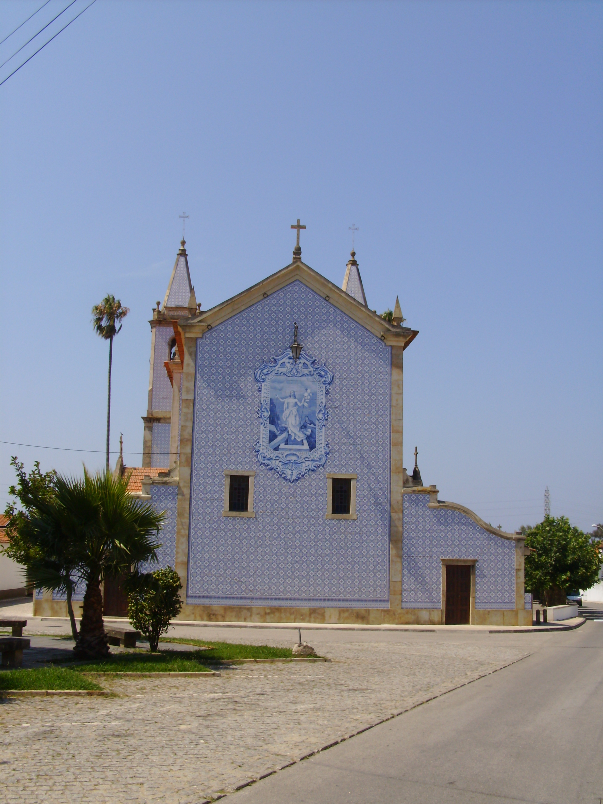 Igreja de Santa Marinha de Cortegaça, concelho de Ovar, distrito de Aveiro, Portugal: aspecto da fachada dos fundos.